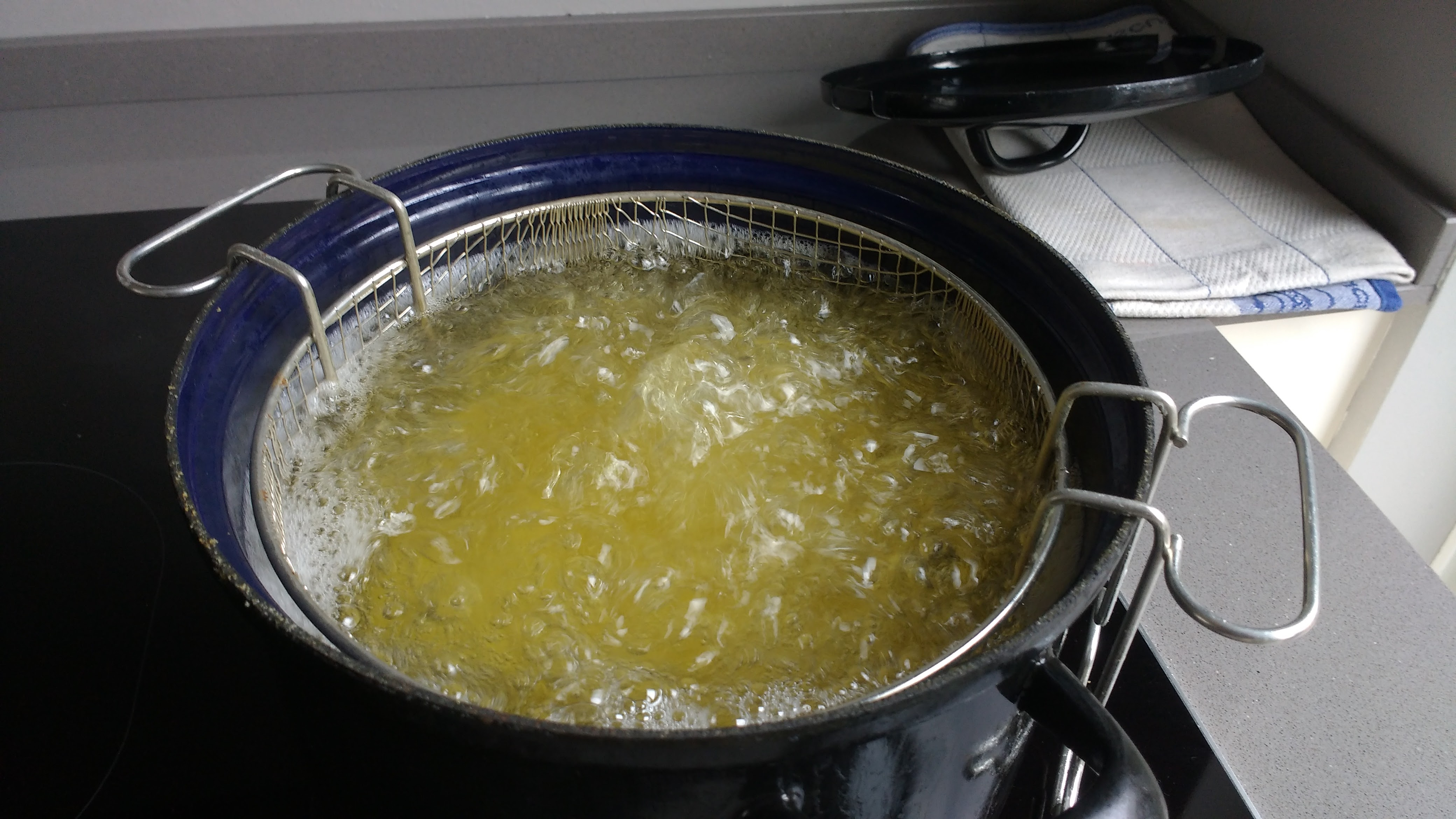 Kokend frituurvet